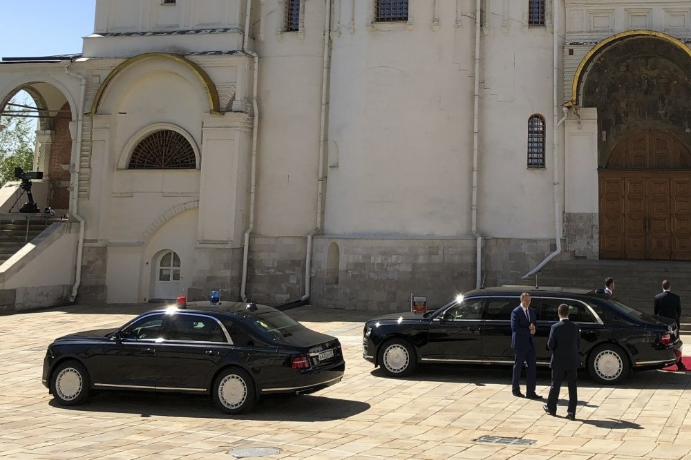 Машина сопровождения Aurus Senat проекта "Кортеж" (слева)